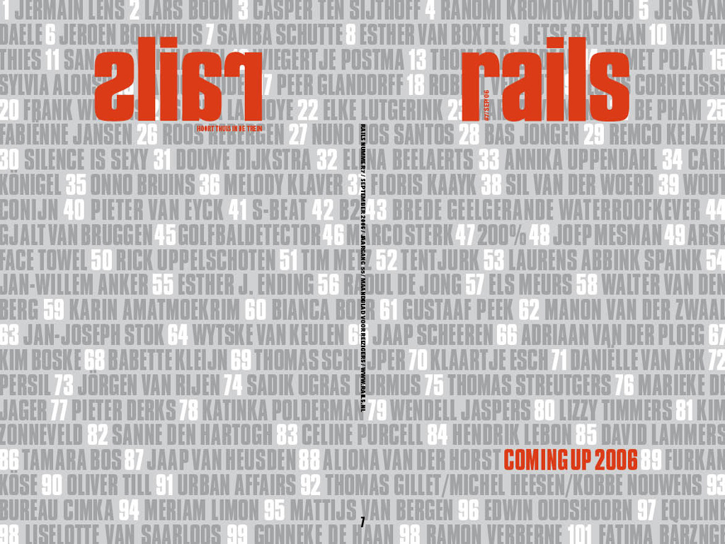 Omslag van NS-blad Rails, gedownload van met toestemming per email van "Bureauredacteur Rails".